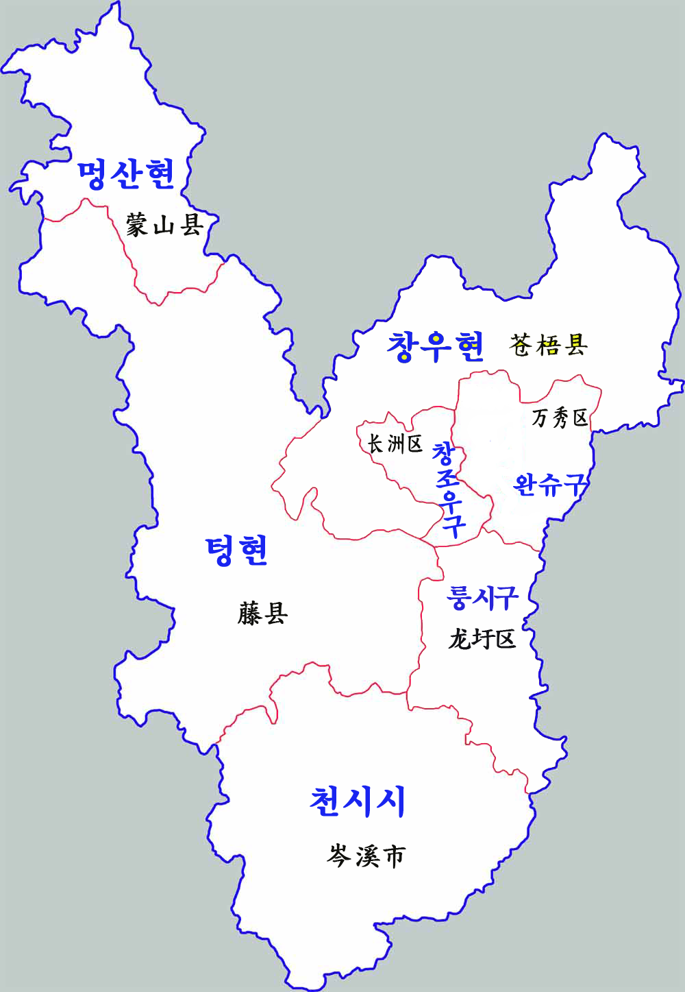 우저우시 현급구역도